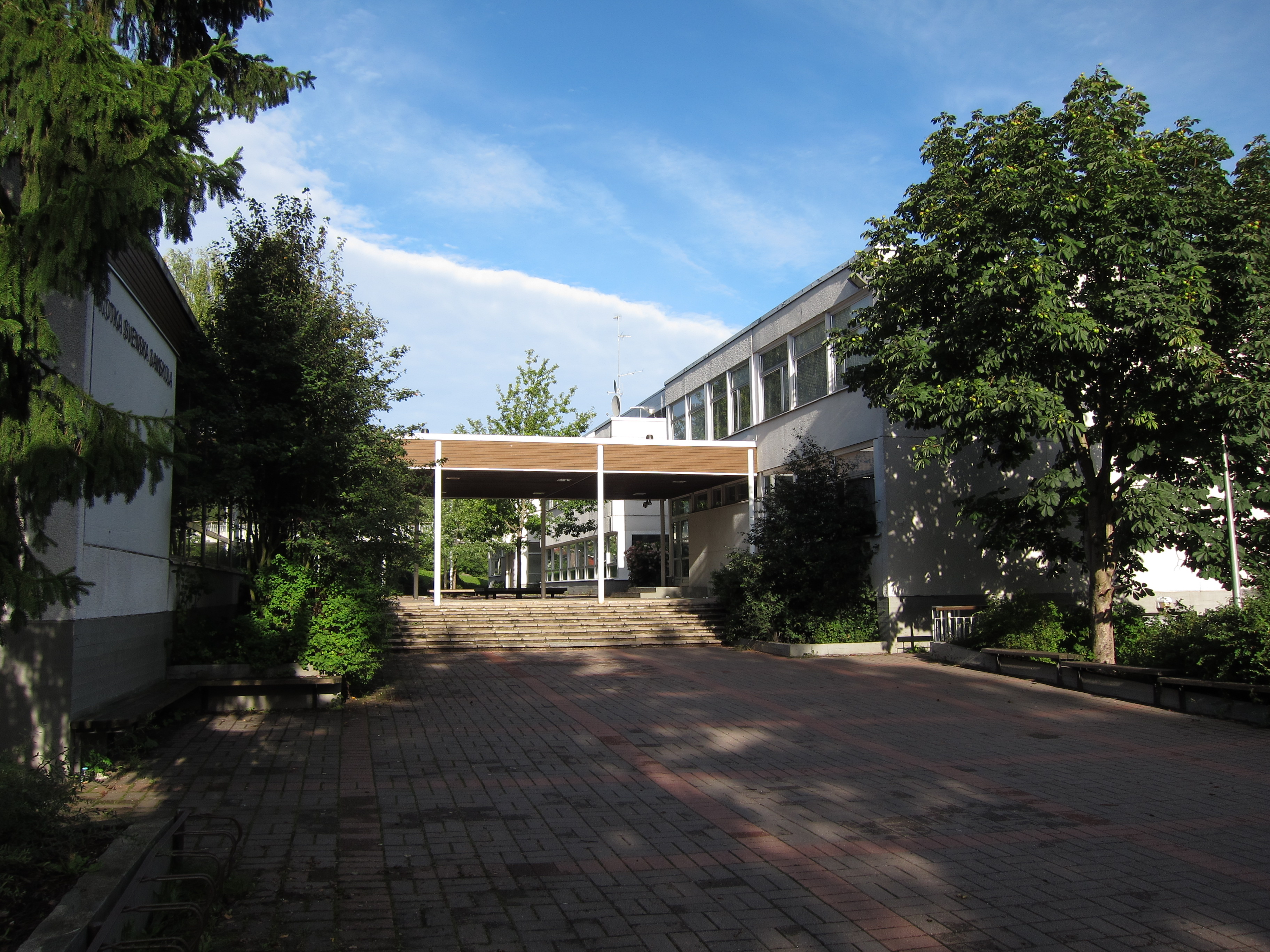 Kotka Svenska Samskola, Kotkassa sijaitseva ruotsinkielinen koulu, jossa toimivat peruskoulun vuosiluokat 1-9 ja lukio.